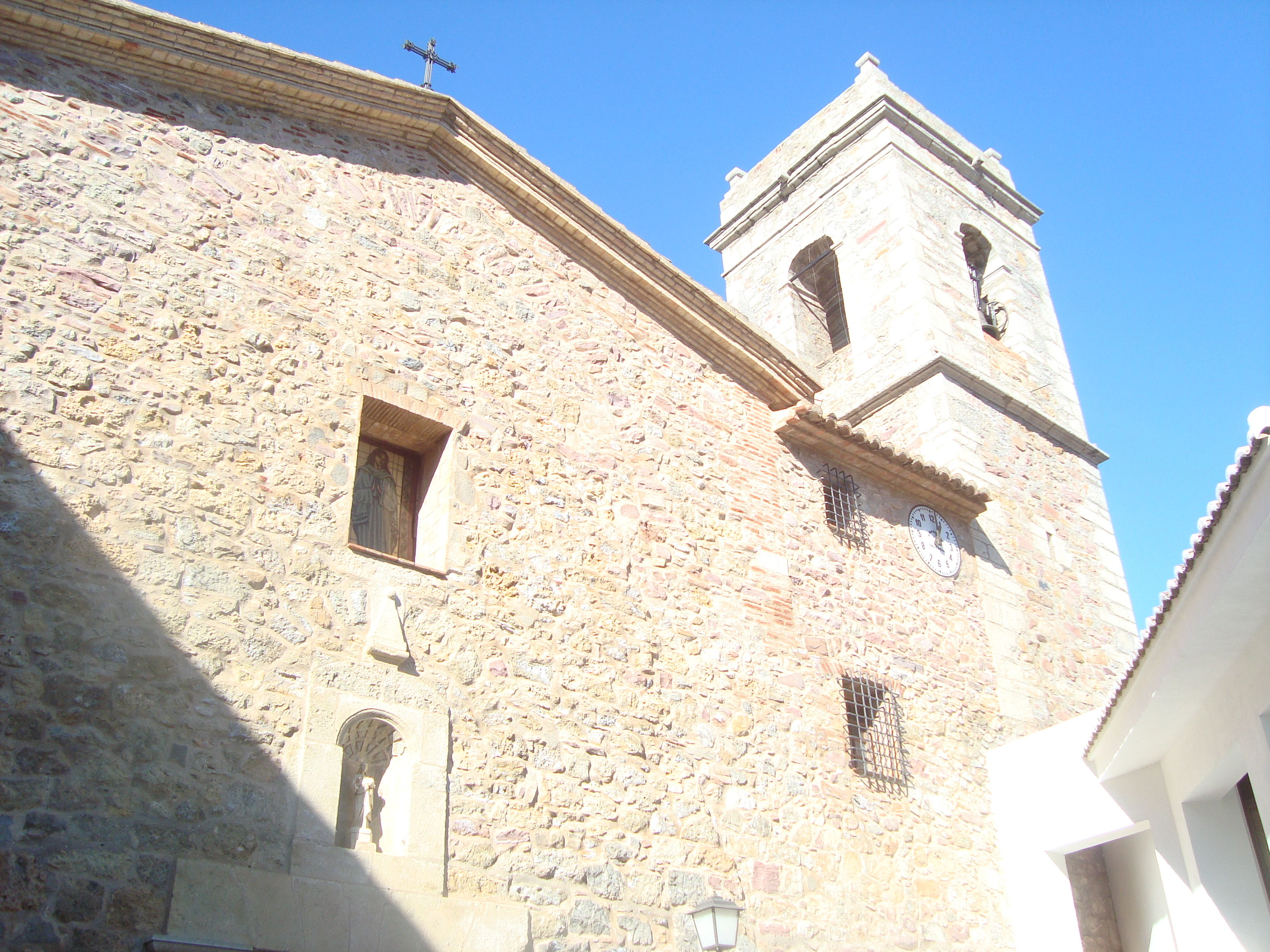 Església parroquial del Salvador (Eslida) 06.057-002.